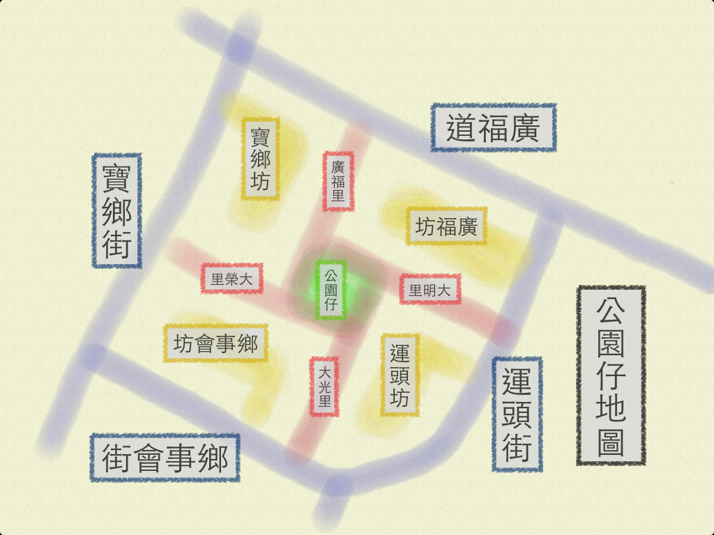 粵語: 大埔公園仔地圖